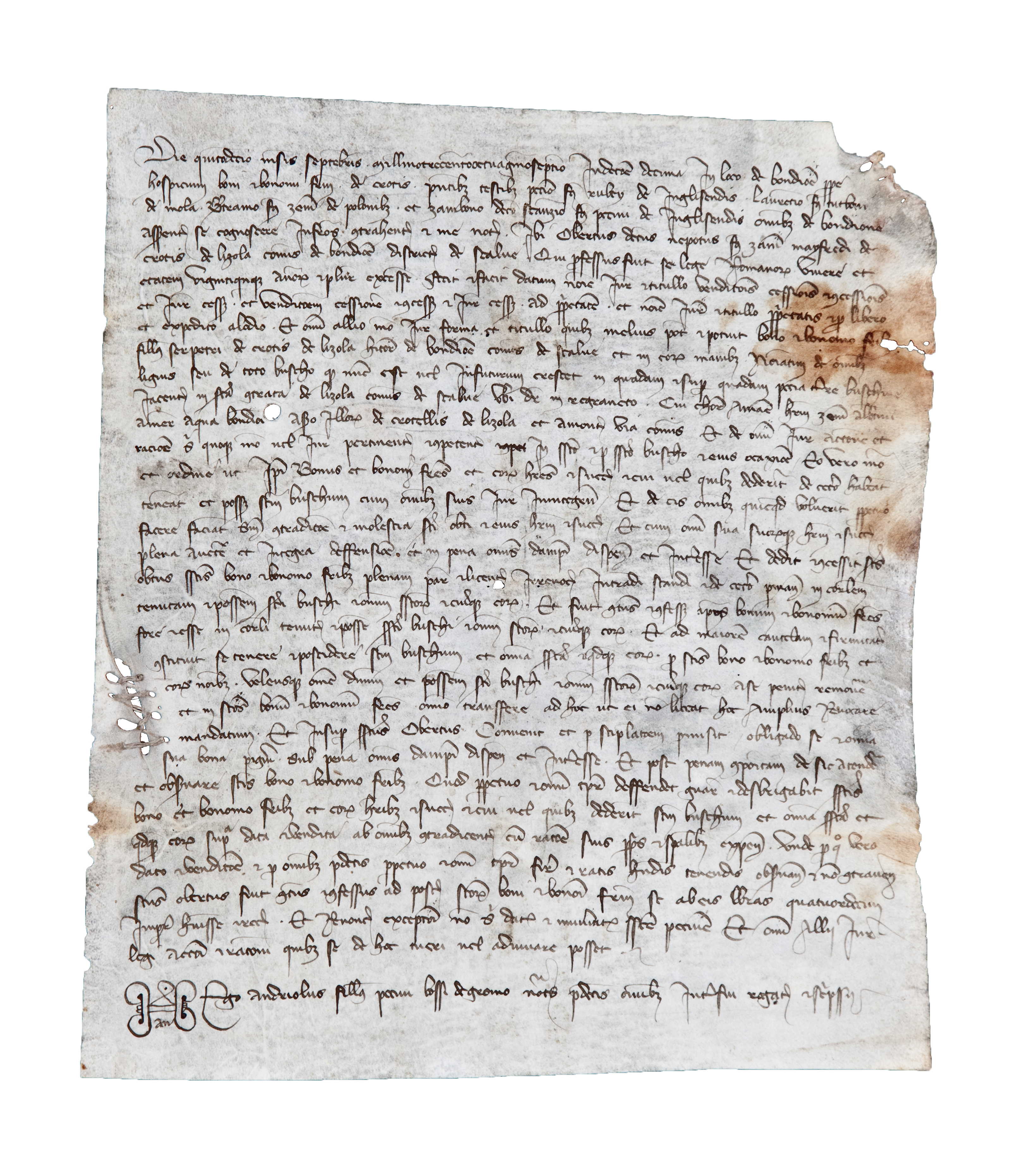 Archivio Pietro Pensa, Pergamene 4, 3